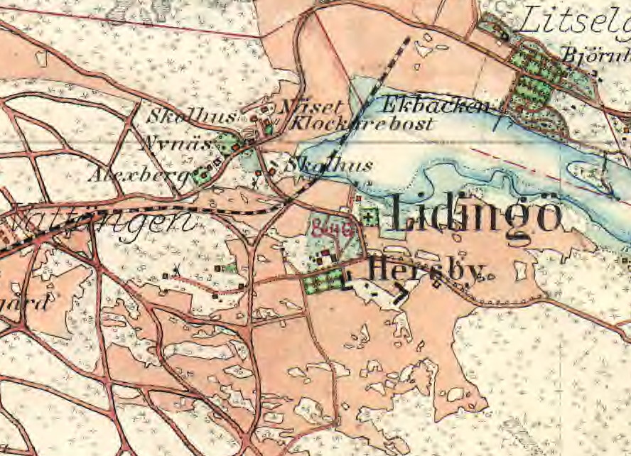 Hersby gård på Häradsekonomiska kartan